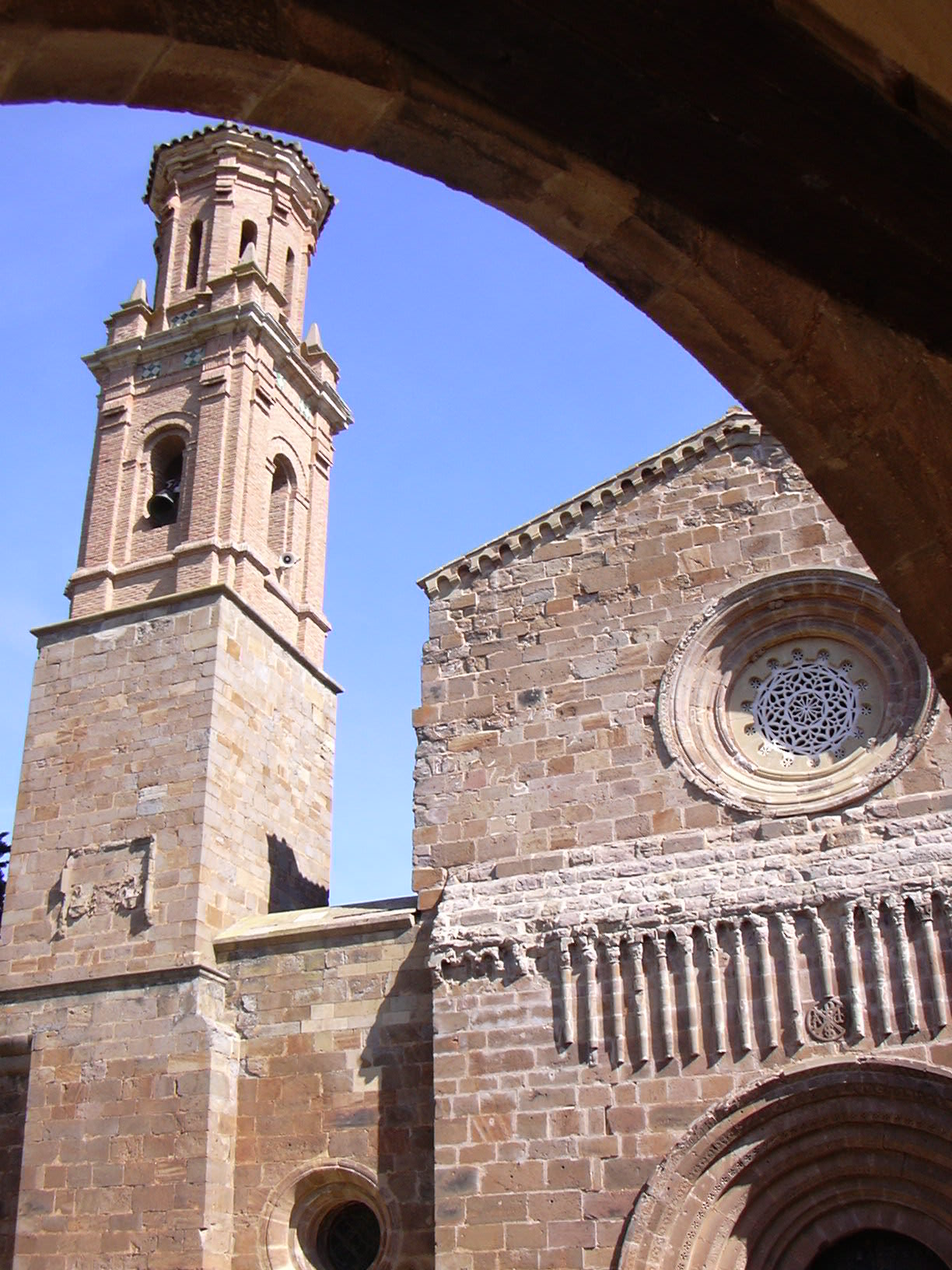 Veruela - Iglesia abacial de Santa María de Veruela - Fachada y torre